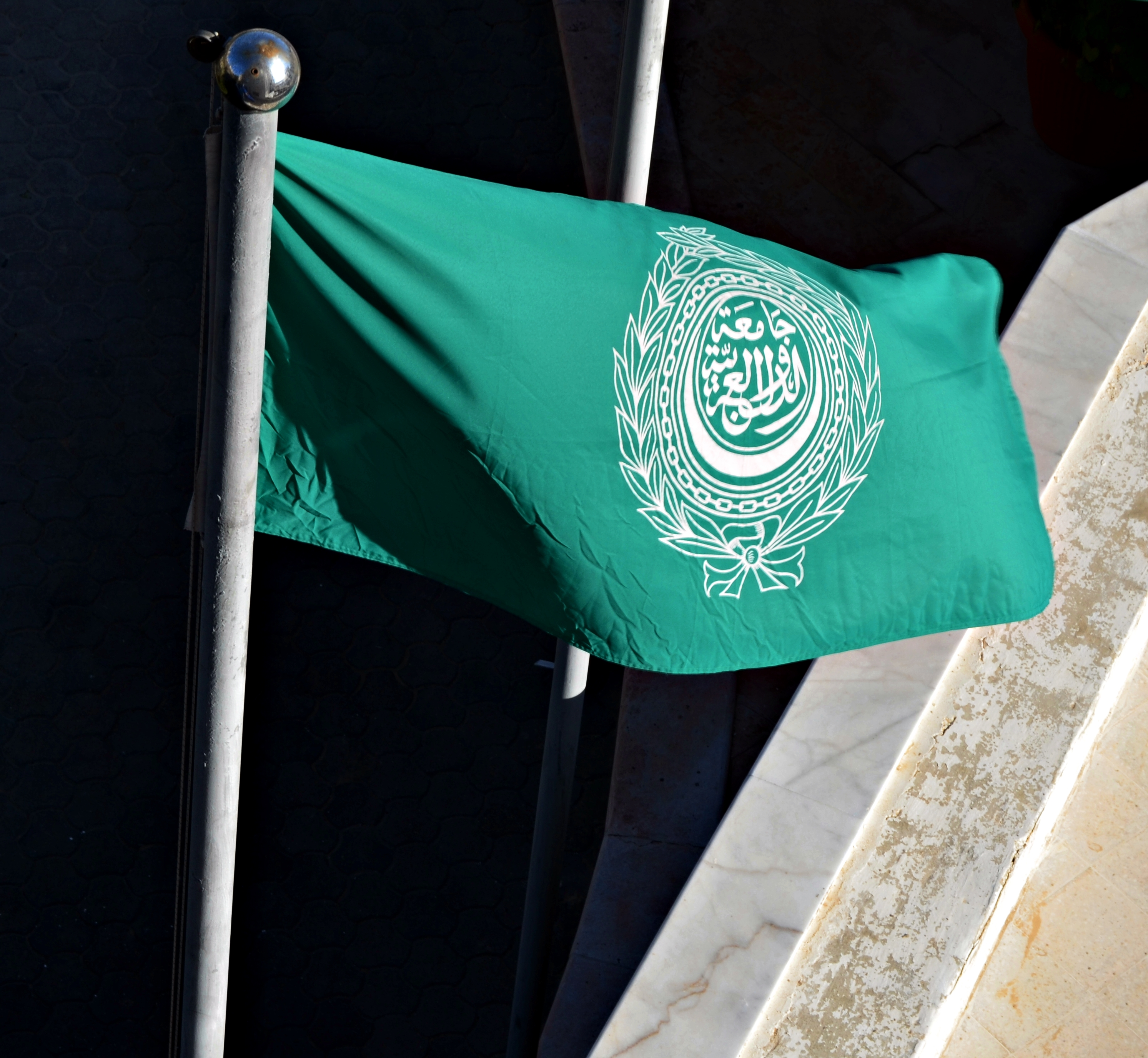 علم جامعة الدول العربية في عمّان، الأردن